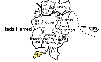 Kort der viser Alrø Sogn, Hads Herred, Århus Amt, Danmark.